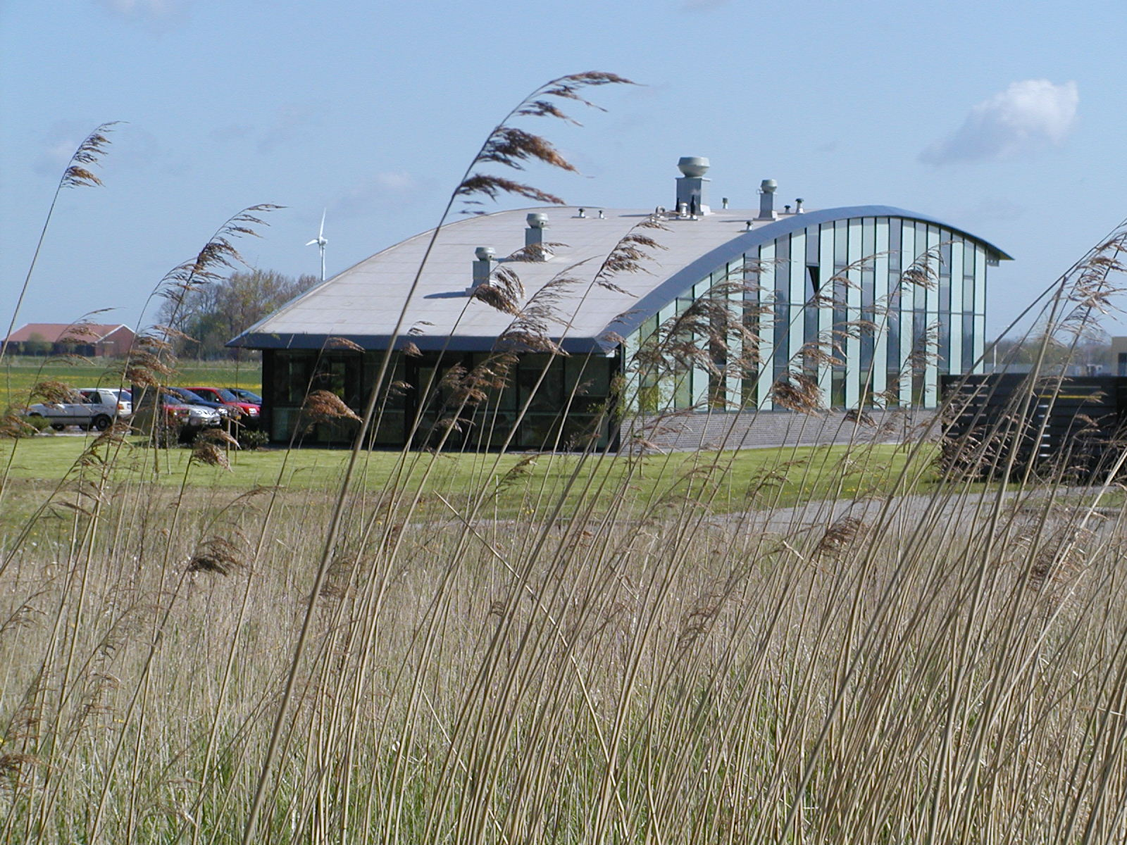 Geschäftsstelle Ems Dollart Region